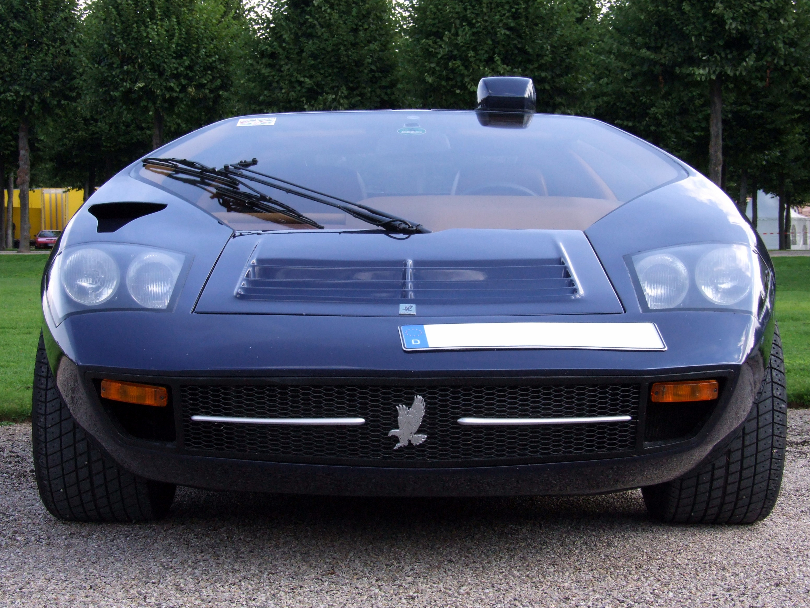 Isdera Imperator 108i Serie 1 (1984 - 1991)